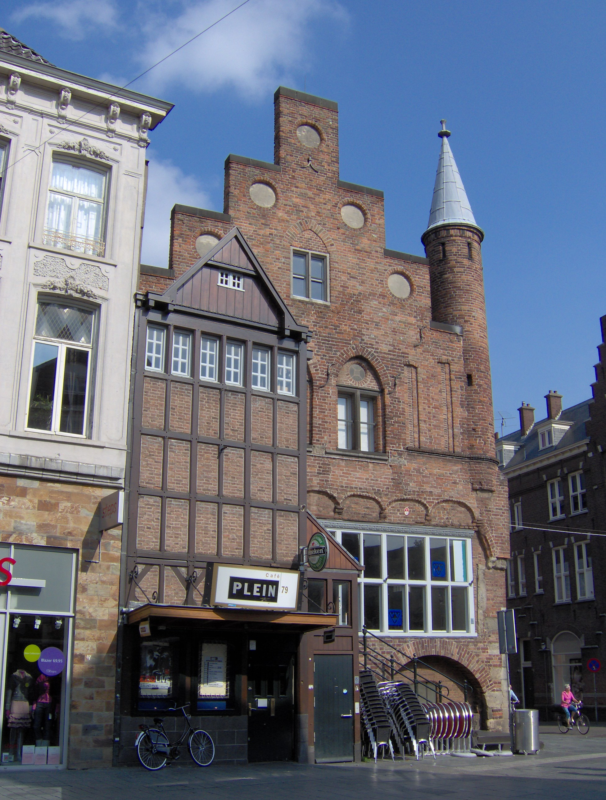 eigen foto categorie:afbeelding 's-Hertogenbosch